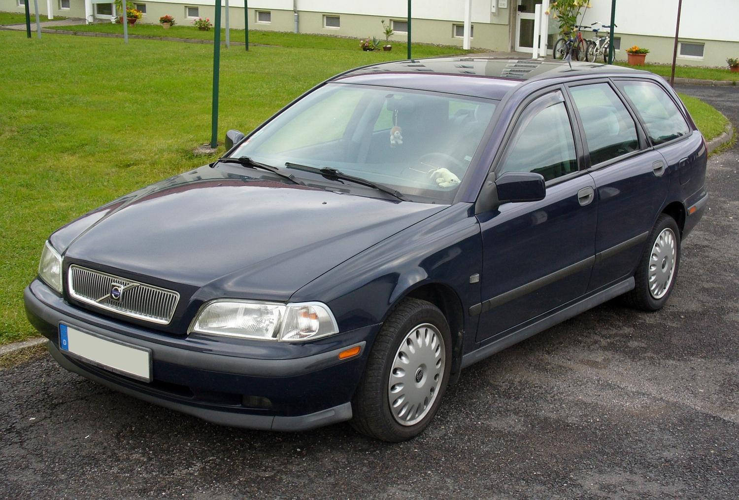 Volvo V40 pre-facelift